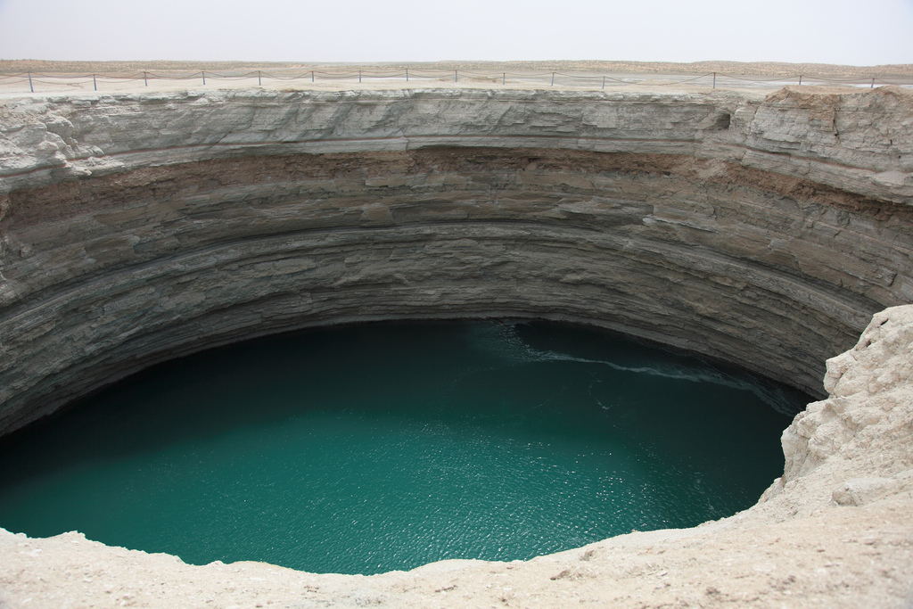 Turquoise Lake Crater / Turkmenistan, Darvaza